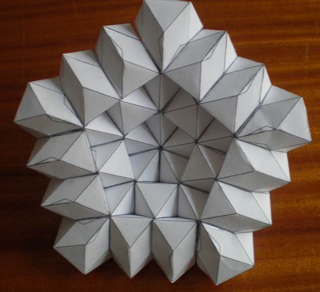 A második ikozaéder belülről